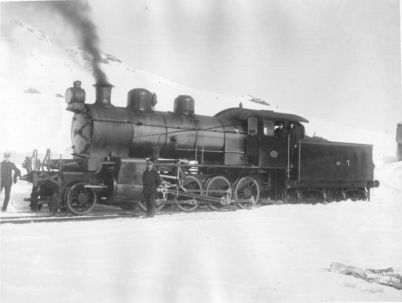 Høifjeldslokomotiv no.191 15/4 1909